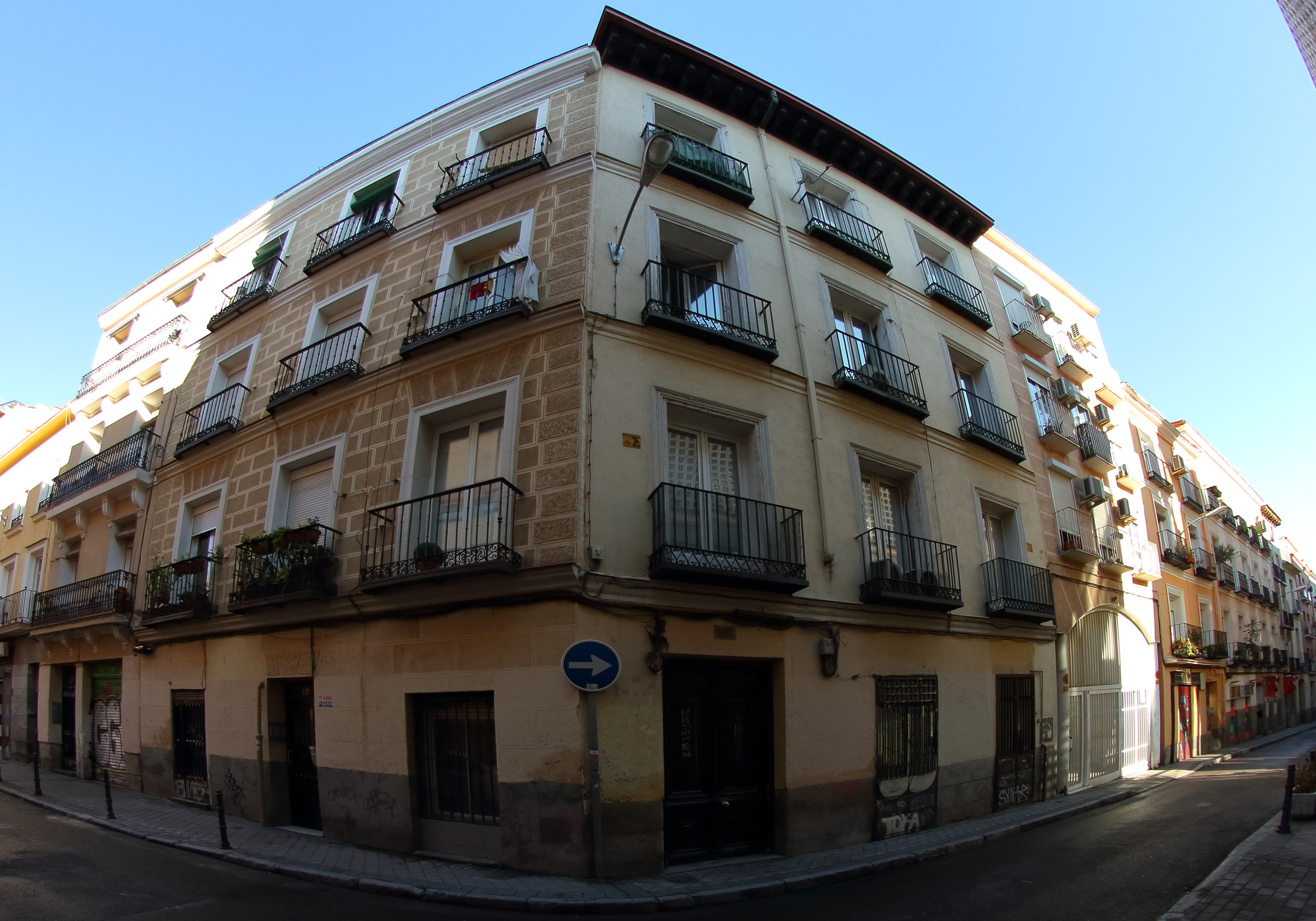 Calle Santa Brigida, recodo de la calle en el nº 12 (en 2016)